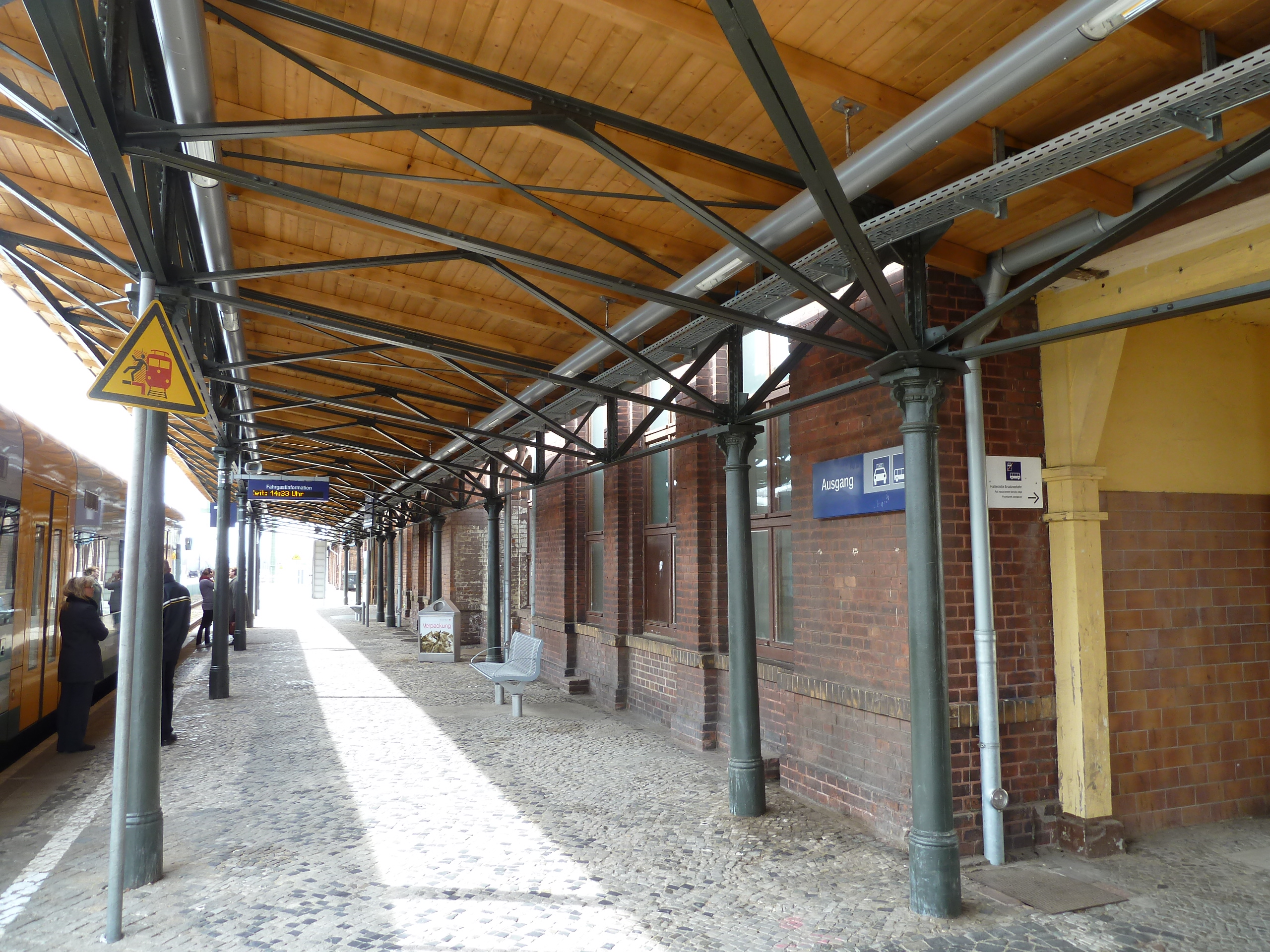 Bahnhof Forst, Bahnsteig 1